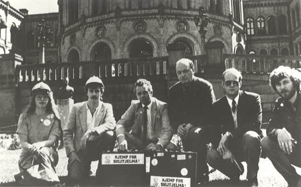 Utenfor Stortinget, Sulitjelmasaken. Til høyre samorgformannen Knoph. Gitt av Nordlands Framtid. 1983 NM.F.008006-00007